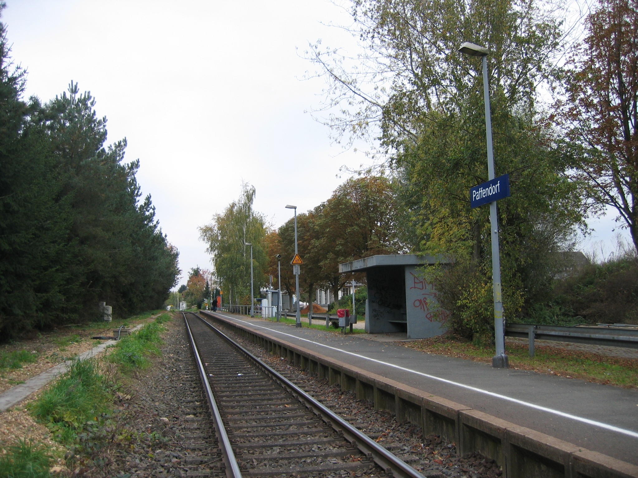 Bahnhof Paffendorf an der Erftbahn